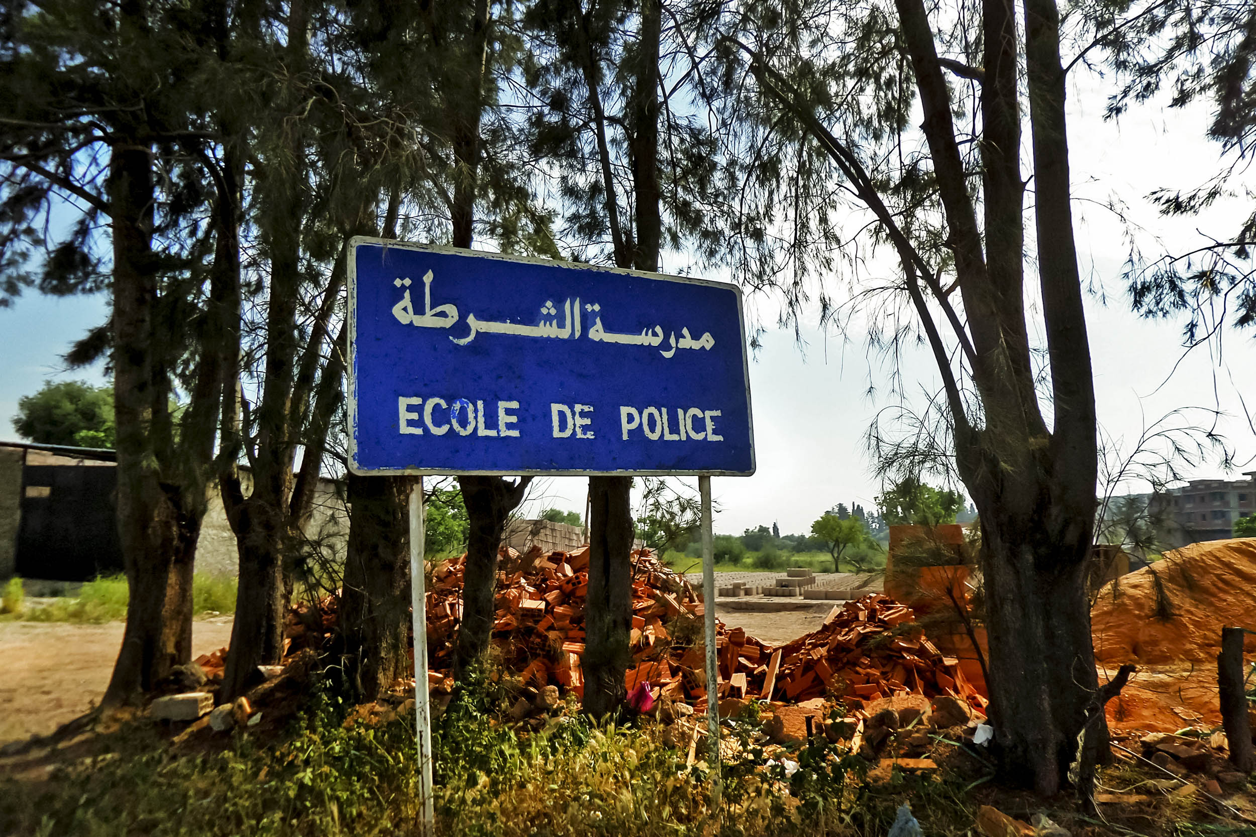 Soumaa - école de police مدرسة الشرطة